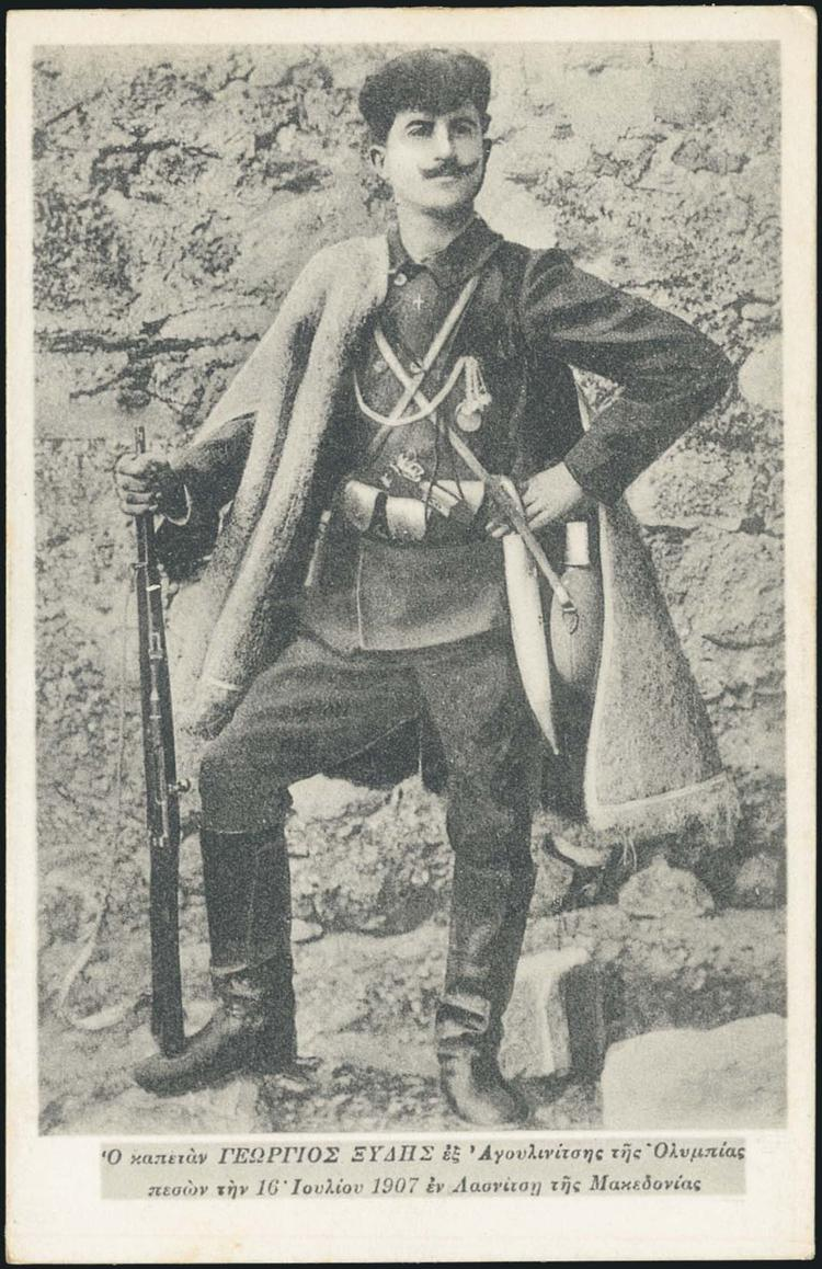 Гръцкият андартски четник Георгиос Ксидис